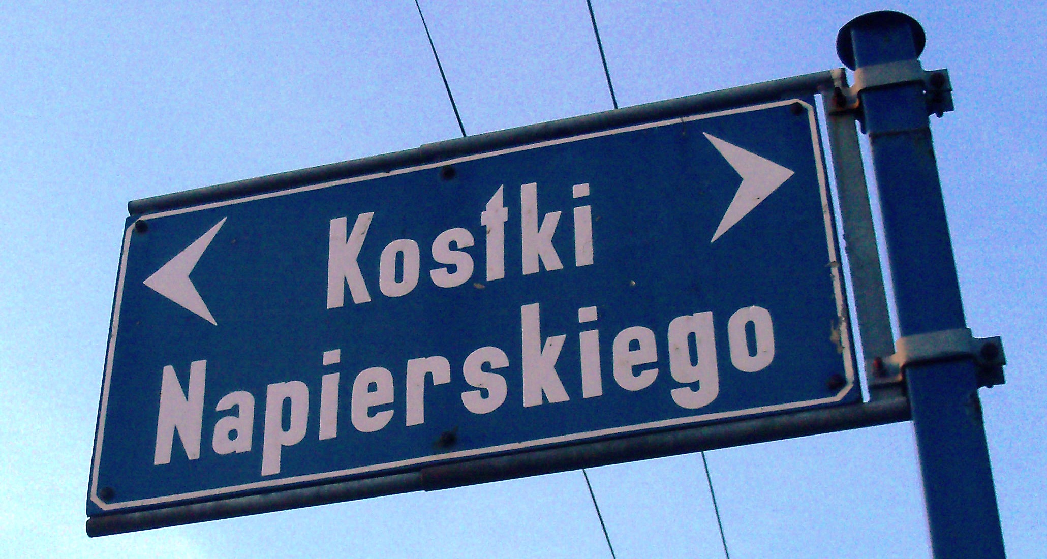 ulica Kostki-Napierskiego w Katowicach (znak)